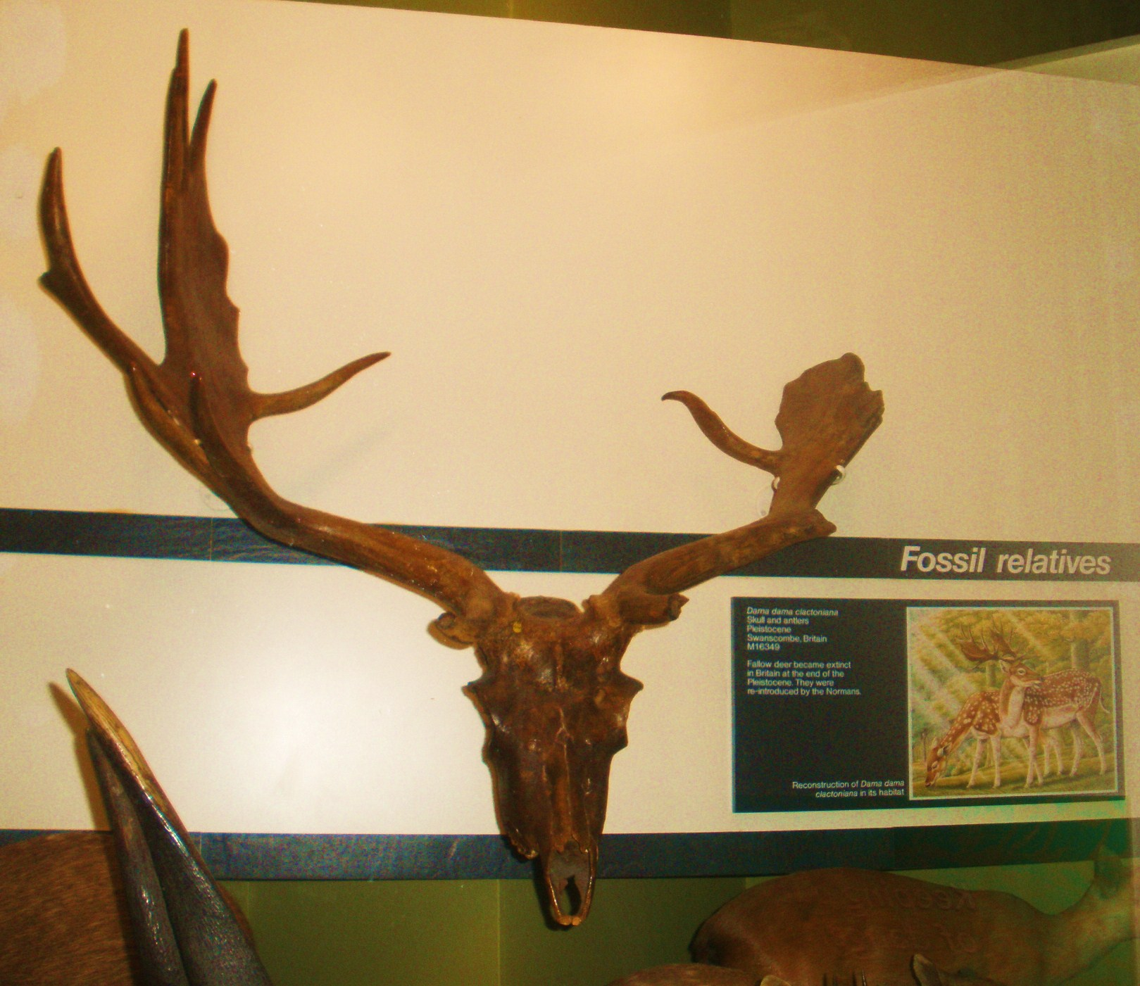 Fossil of Dama, an extinct mammal -- Took the photo at Natural History Museum, London